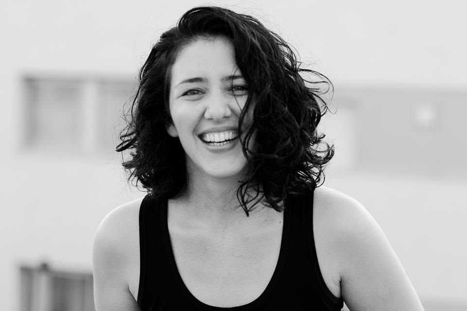 שרון טל